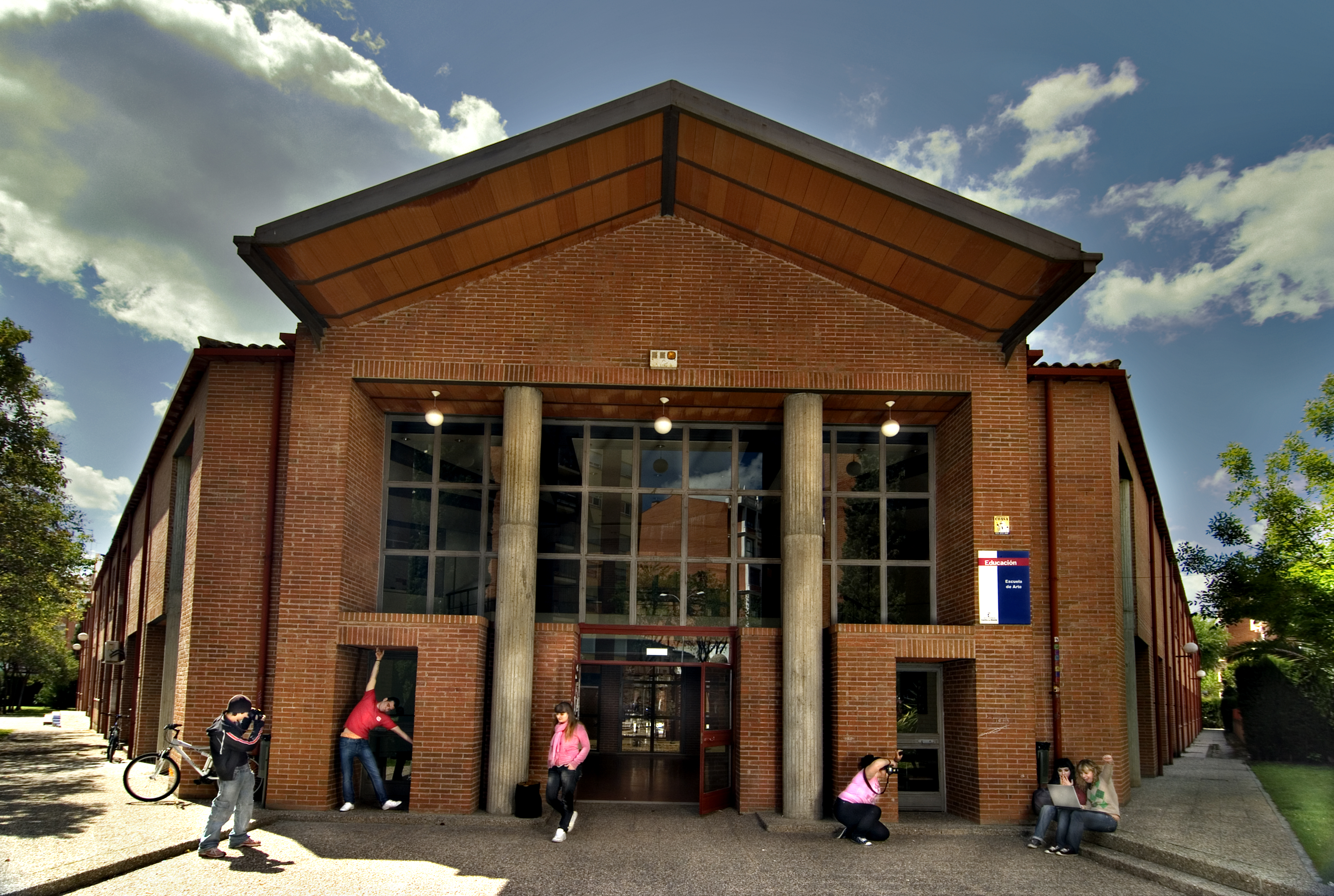 Fachada de la Escuela de Arte TALAVERA